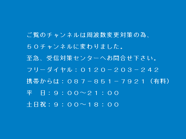 香川県の西讃岐テレビ中継局のアナアナ変換時に、停波予定の旧チャンネルで停波1ヶ月前から表示されたチャンネル変更告知画面。この画像はRNC西日本放送の20ch。